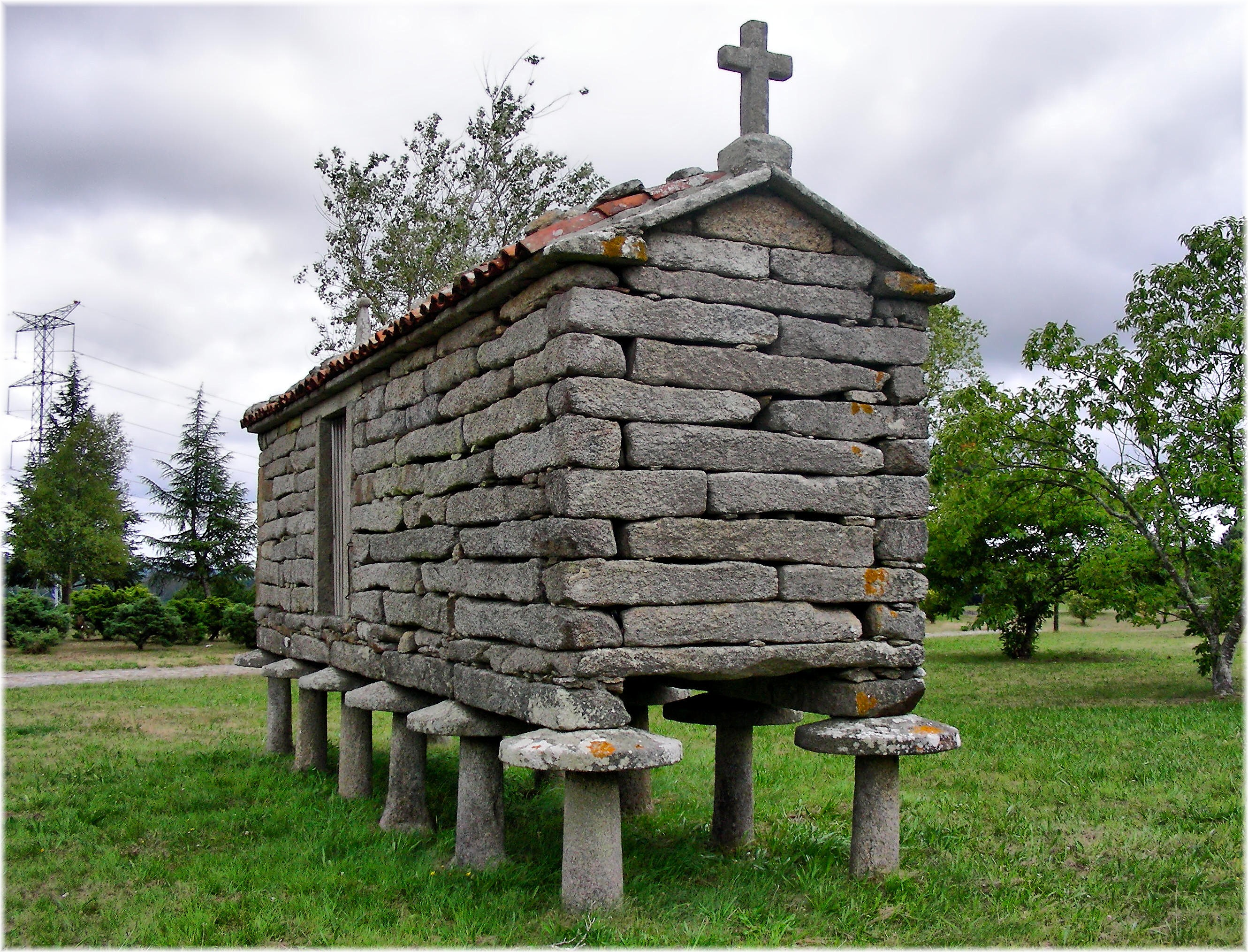 Hórreo in Galicia